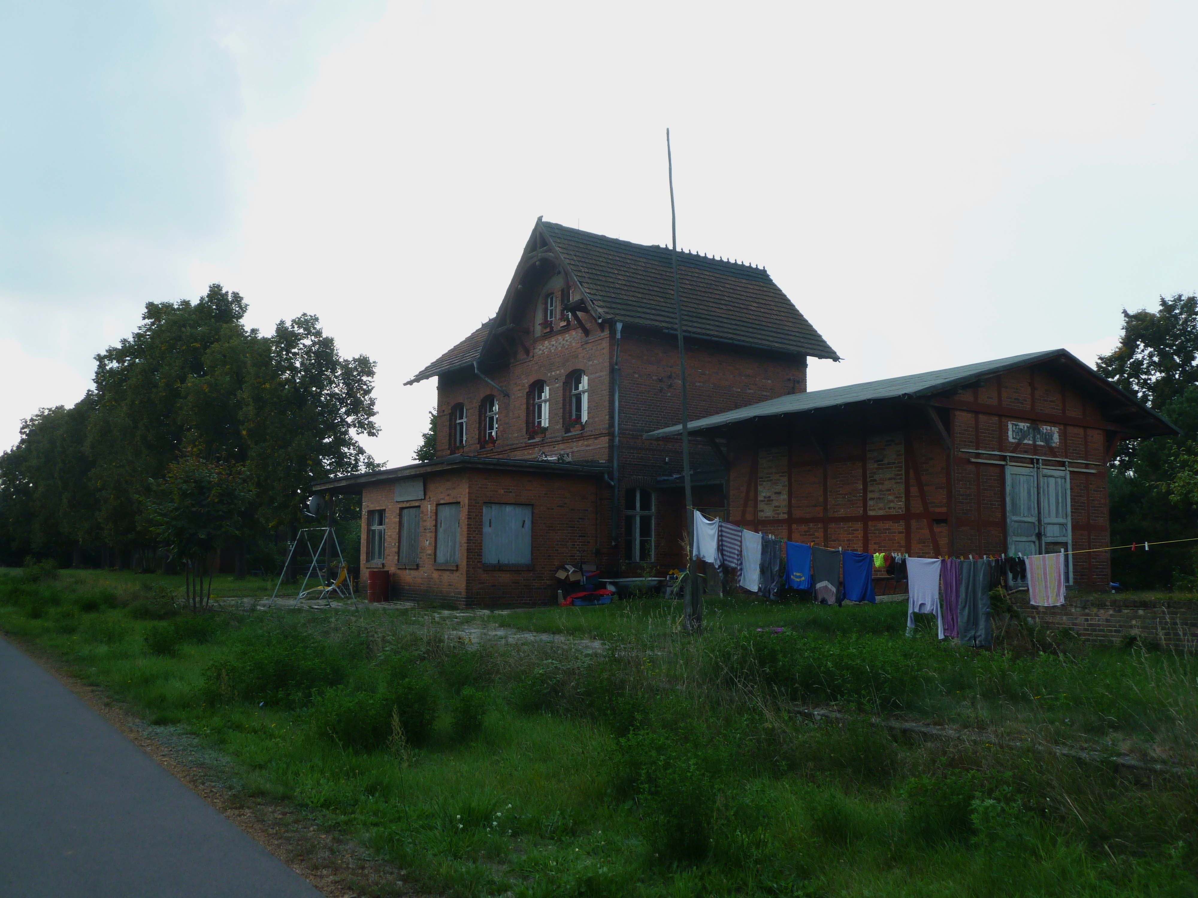 Bahnhof Briesnig, Blick von Nordosten